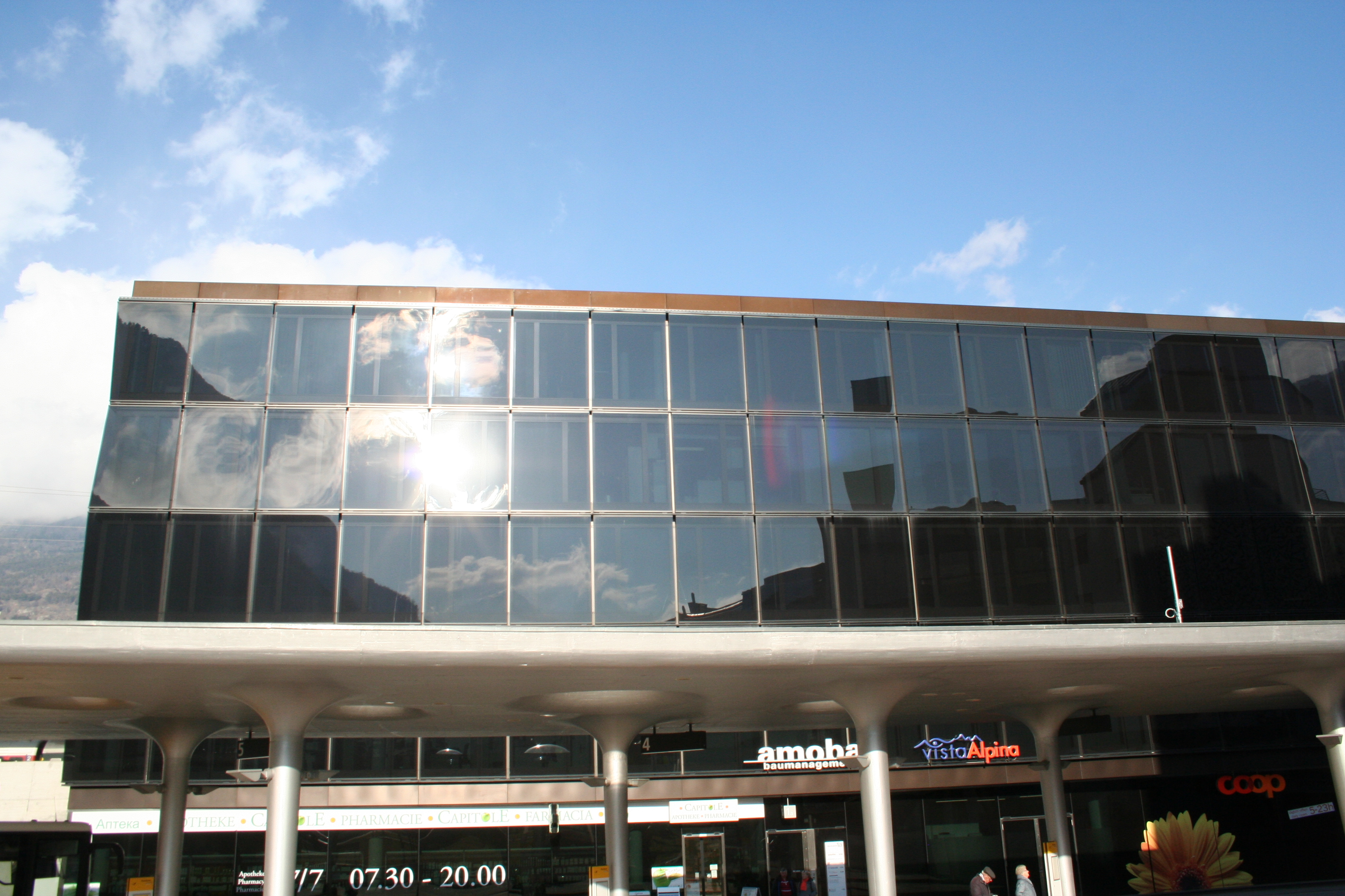 Bahnhofsgebäude Visp